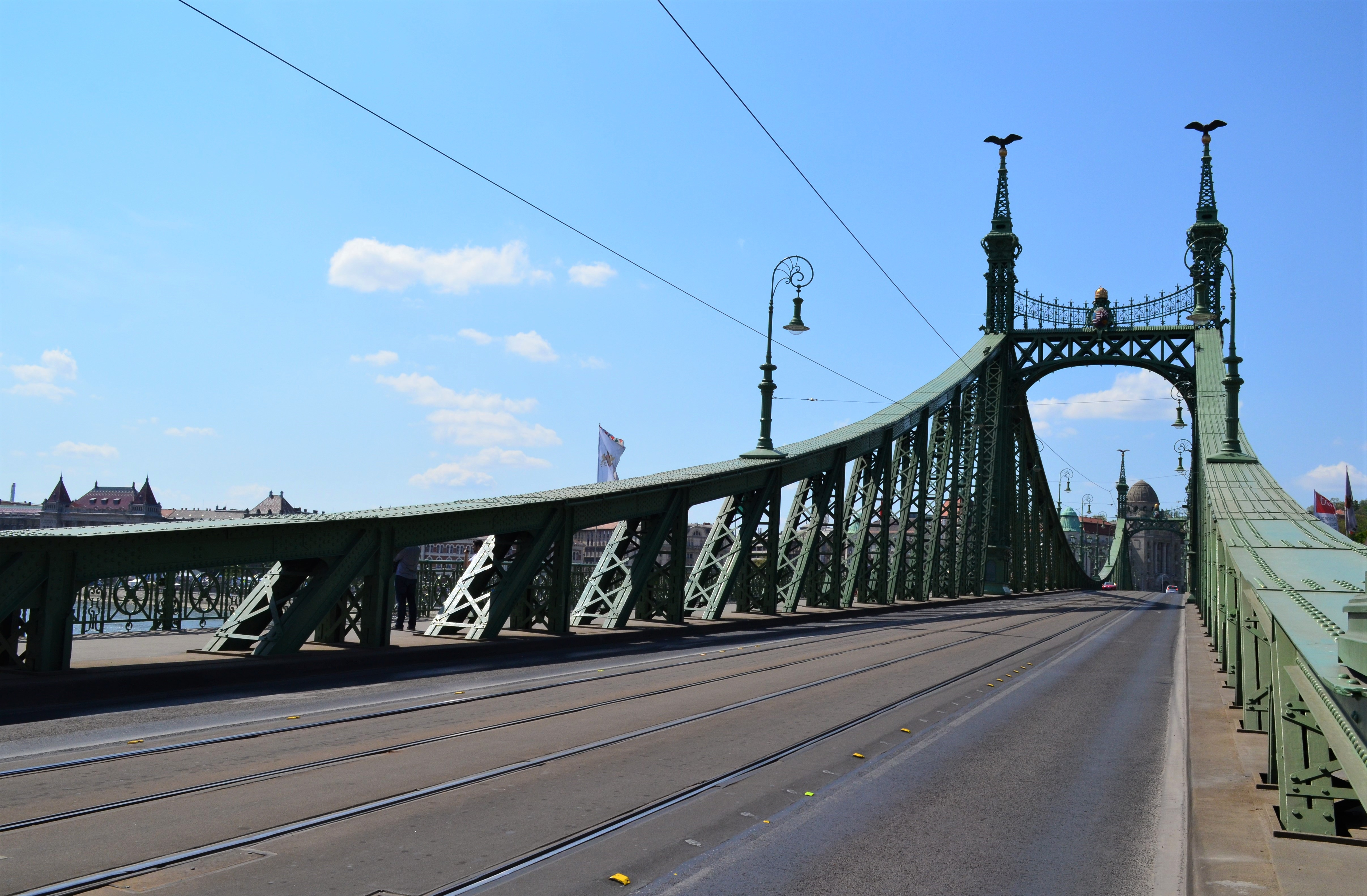 Міст Свободи Будапешт